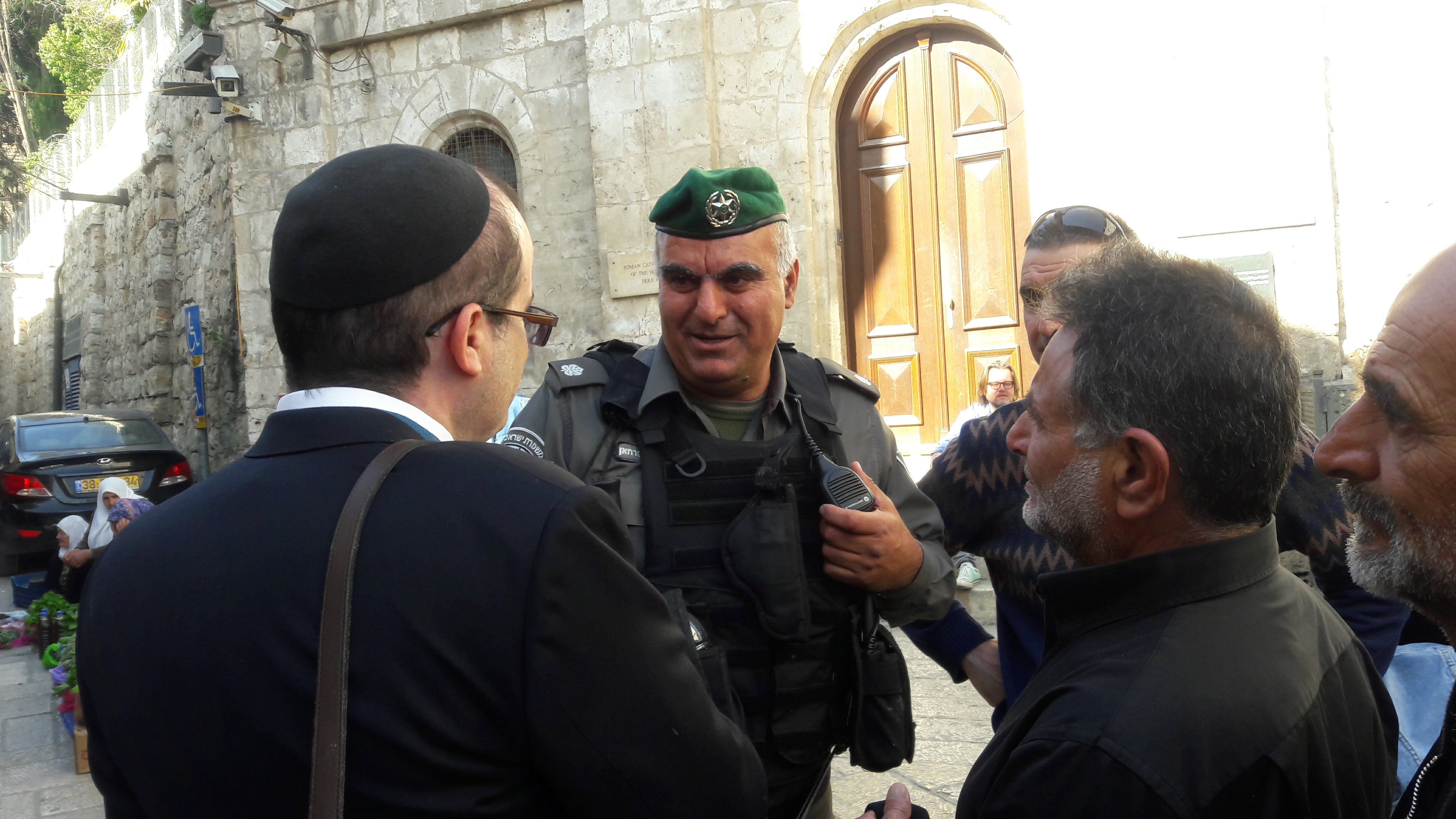 במסגרת מיזם שבת יתרו תשע"ח חברת יקיר יזמה סיור למשפחות שכולות מעדה הדרוזית, בין המשתתפים היה עפיף סיתאווי אביו של השוטר האיל סיתאווי שנרצח בפיגוע בהר הבית בשנת 2017.